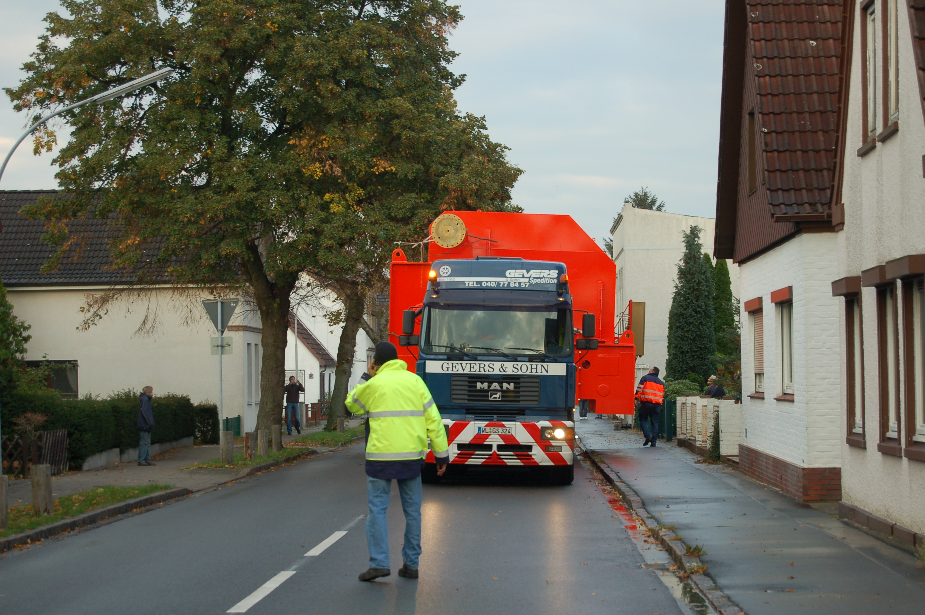 Der zweite Teil der Ankerwinde ist auf dem Weg zum Uetersener Hafen.